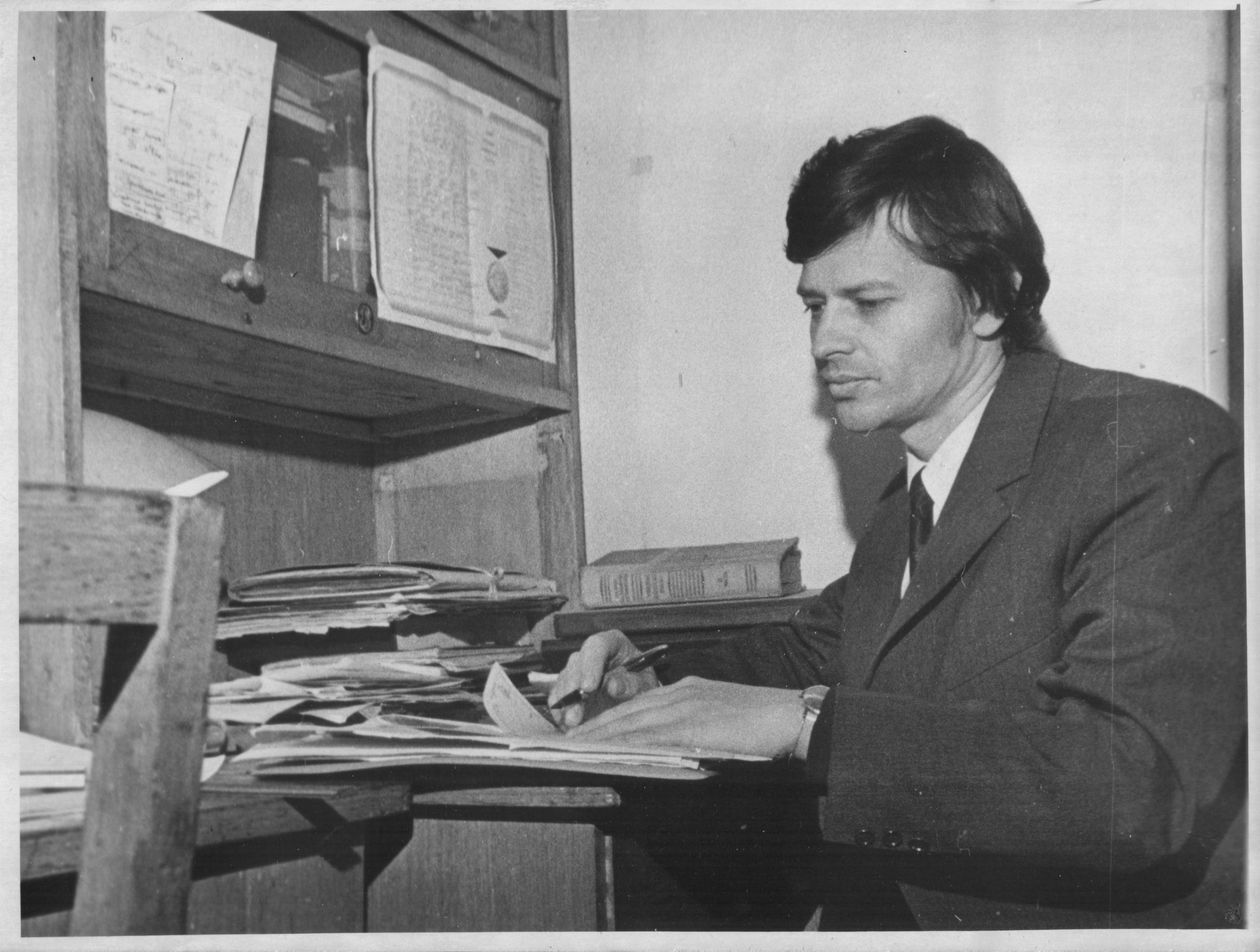 за роботою в лабораторії